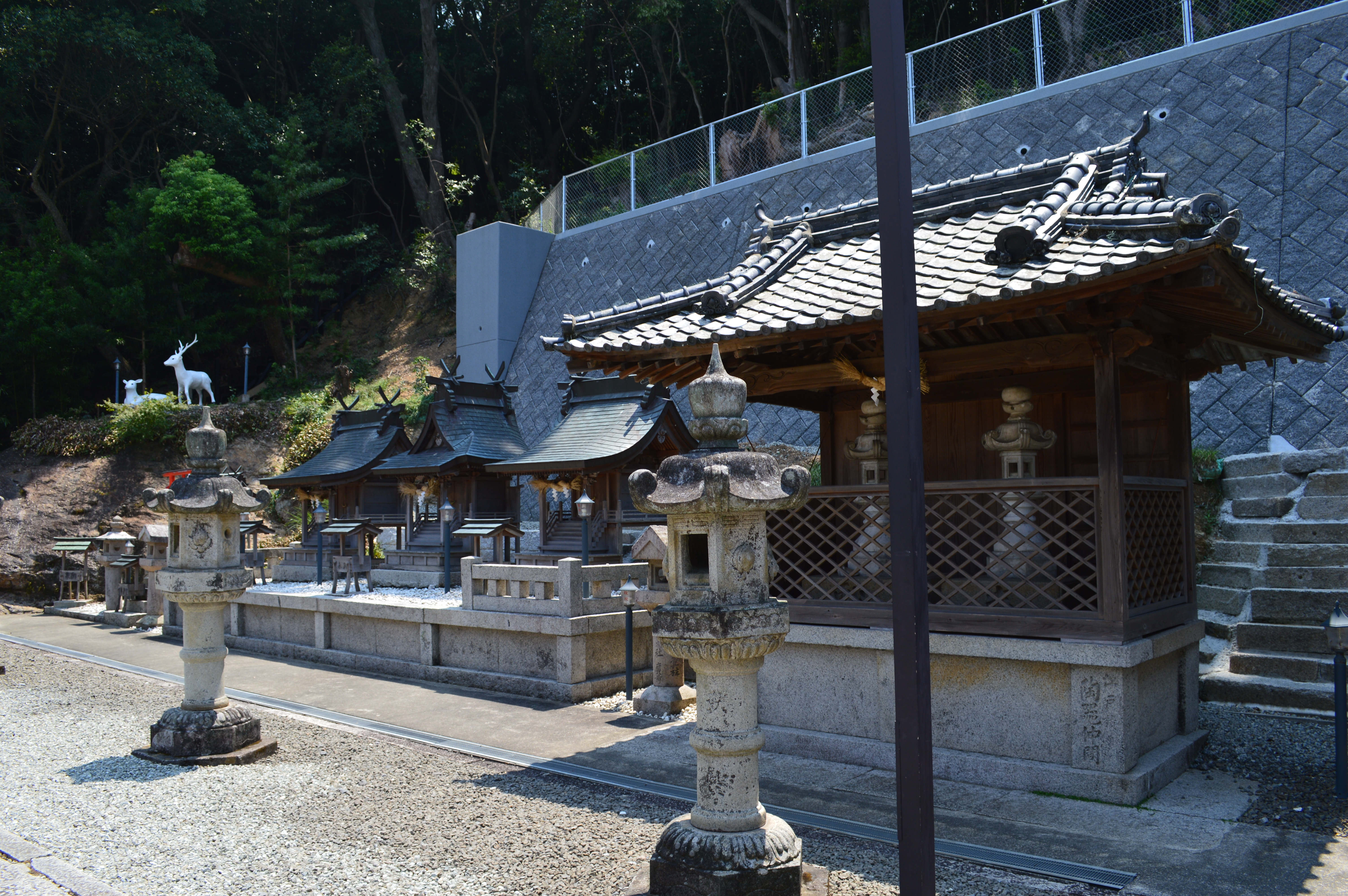 須佐神社 (有田市) 境内社